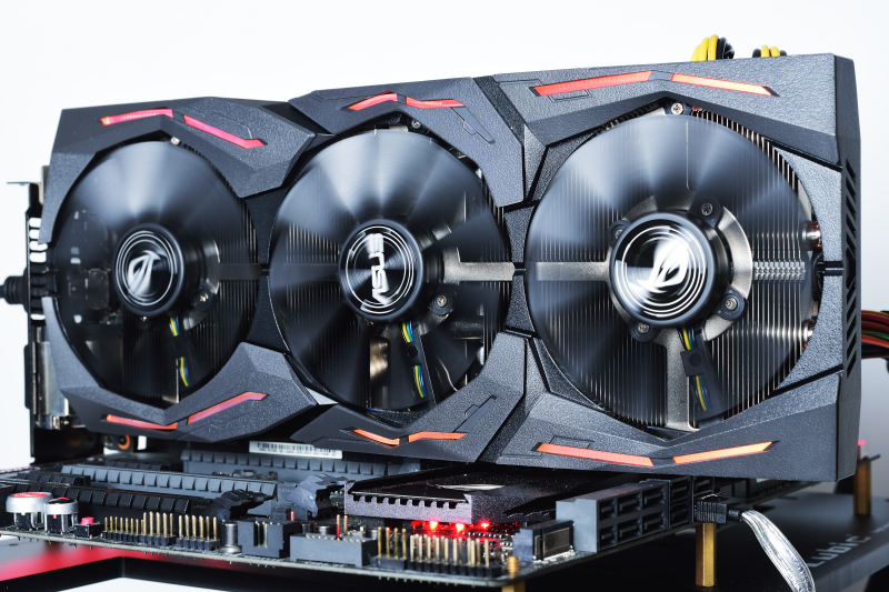 中文（台灣）: 華碩電腦GeForce GTX 1080顯示卡「ROG STRIX-GTX1080-O8G-GAMING」。